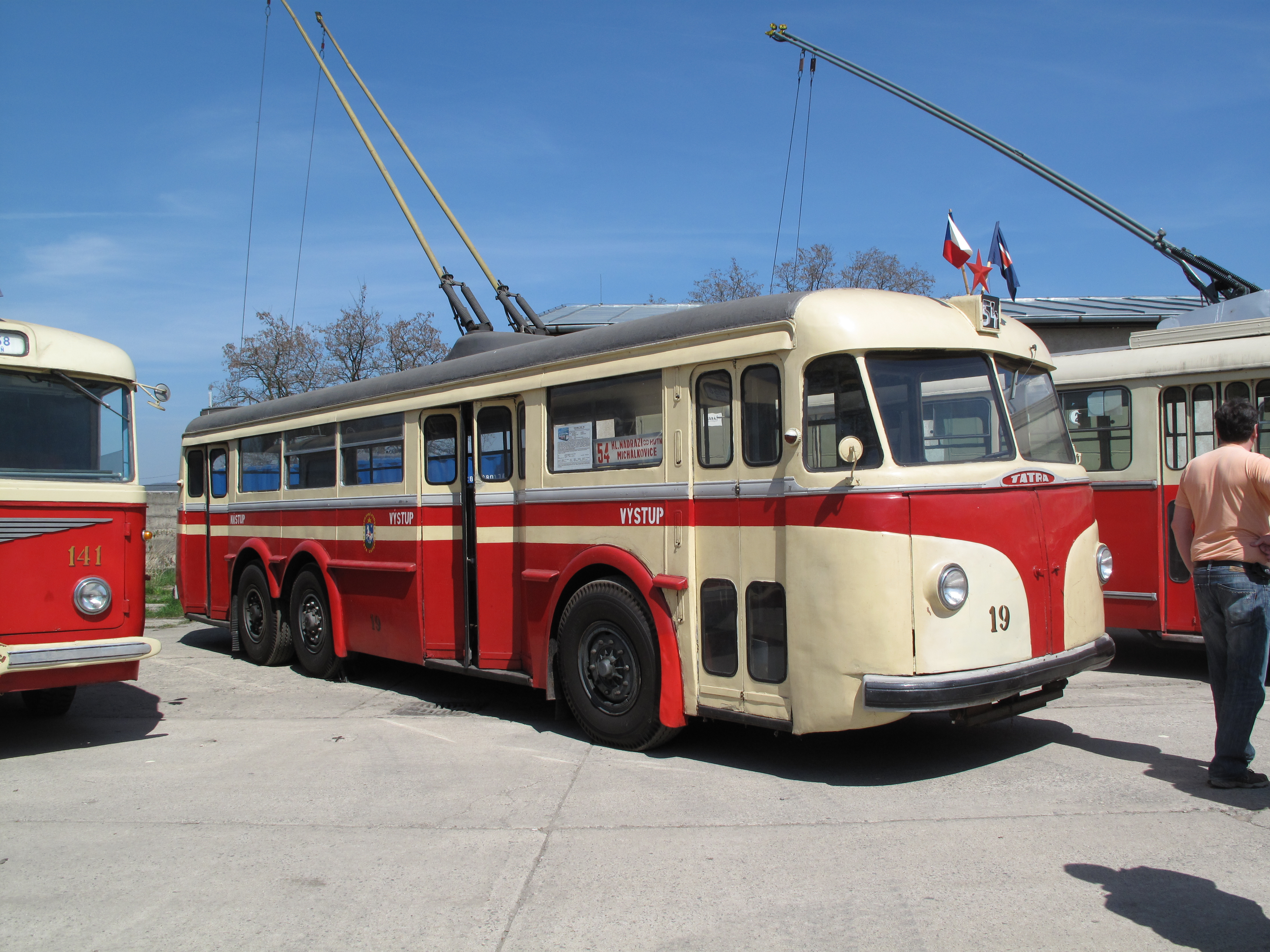 DOD v Řečkovicích 2010